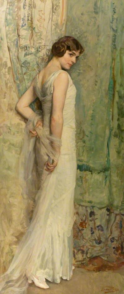 Jeunesse